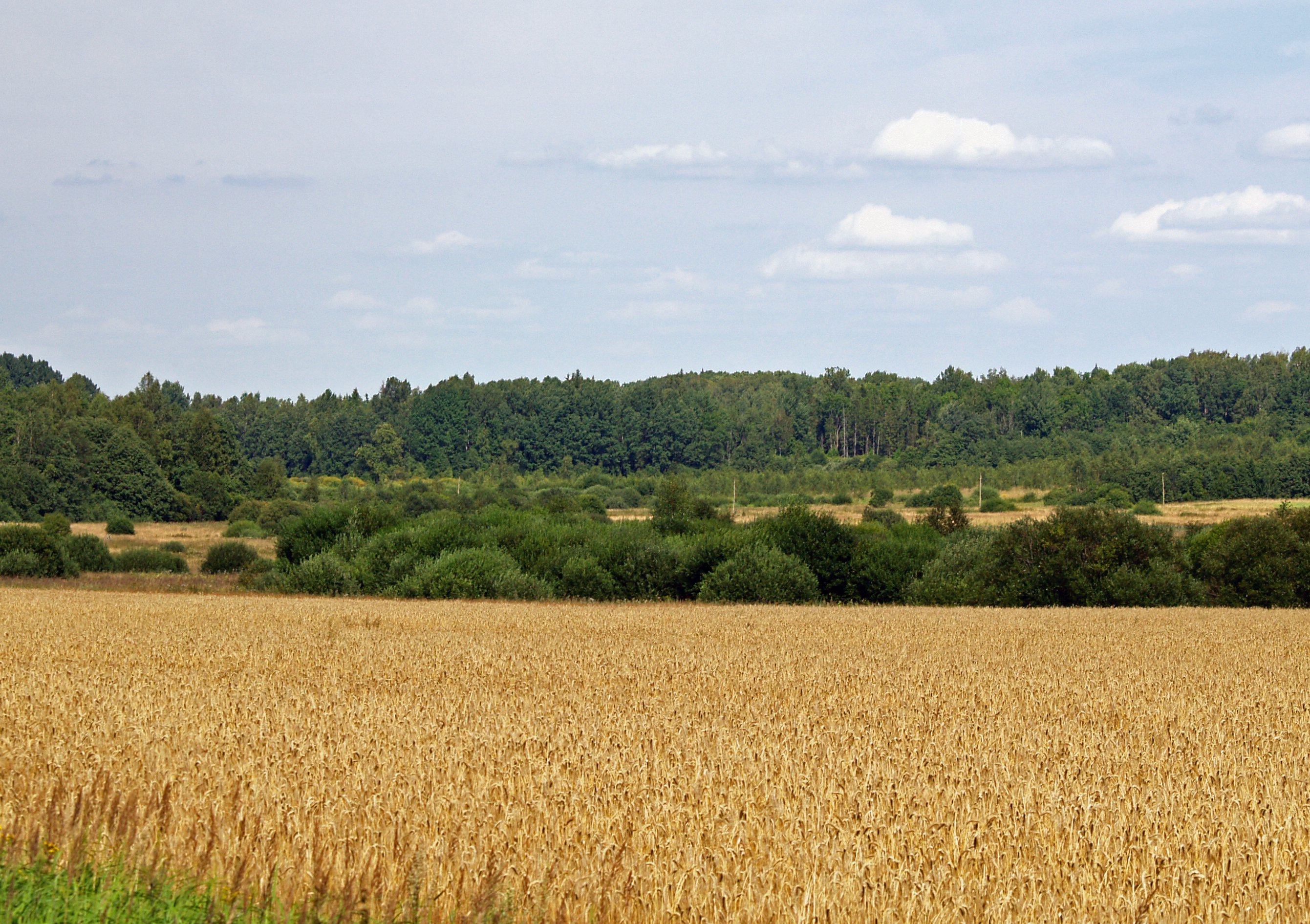 Vasaras briedumā (Summer ripeness)